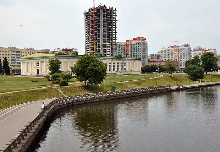 Від на ўсходнюю частку тэрыторыі, якую замала замчышча (унізе злева - вусце р. Нямігі)